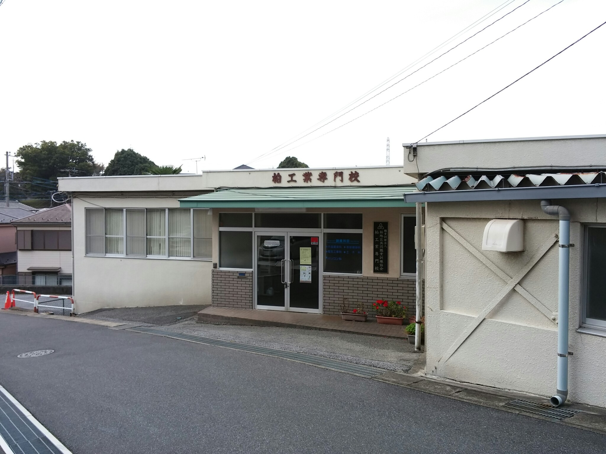 柏市明原 柏工業専門校を撮影